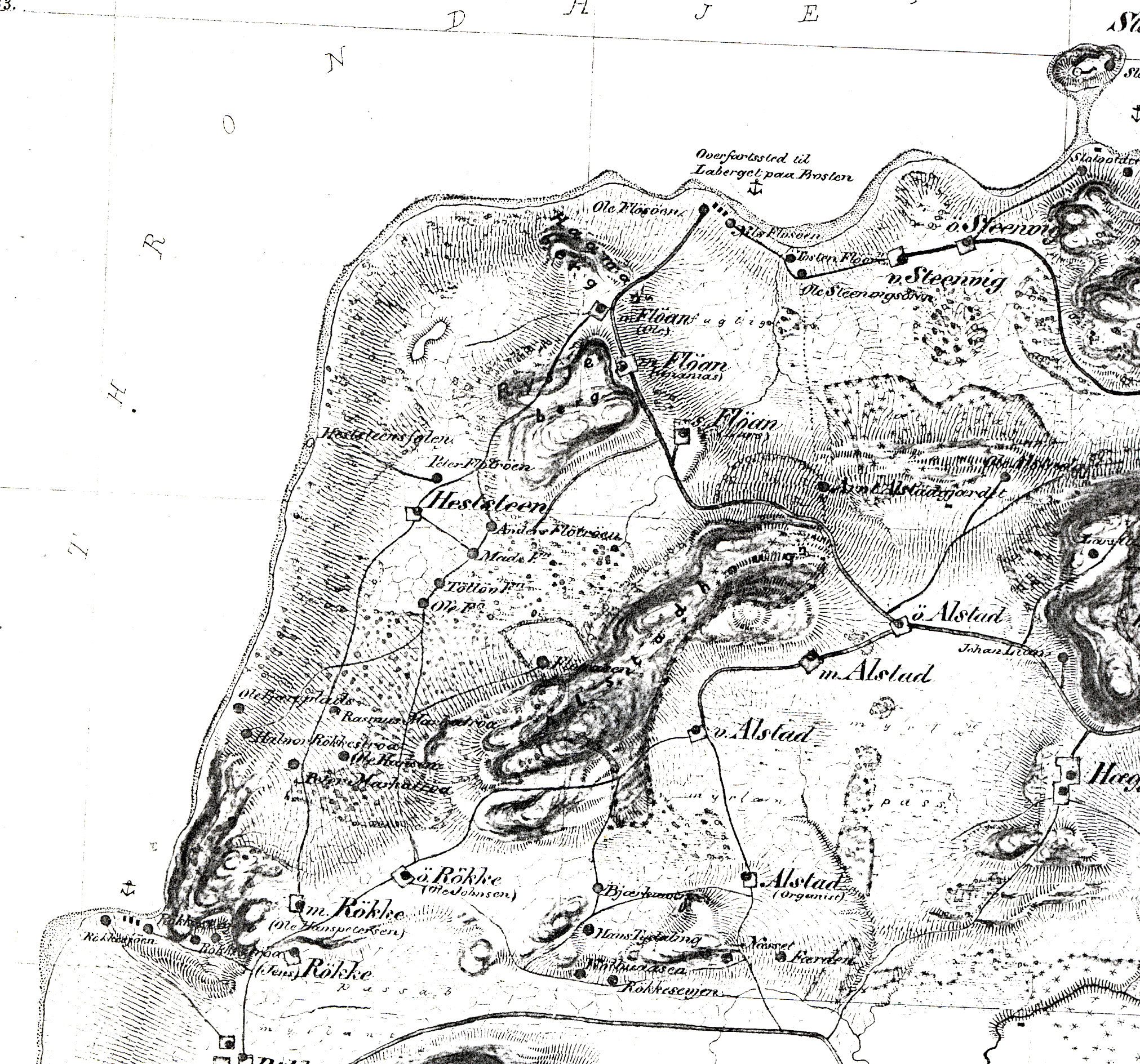 Kartskisse over nordlige partier av Skatval sogn. Gårdene Steinvik, Fløan, Hedstein, Røkke, Alstad og Hegge og husmannsplasser er tegnet inn med navn etter den daværende oppsitteren.